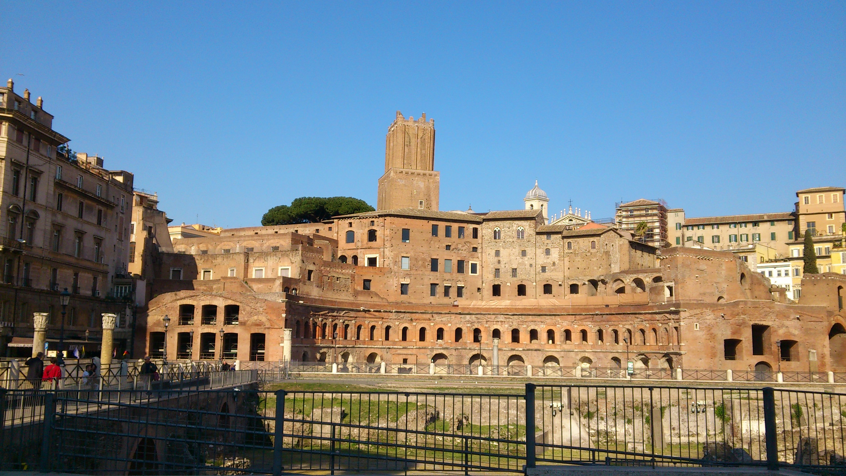 Foro de Trajano